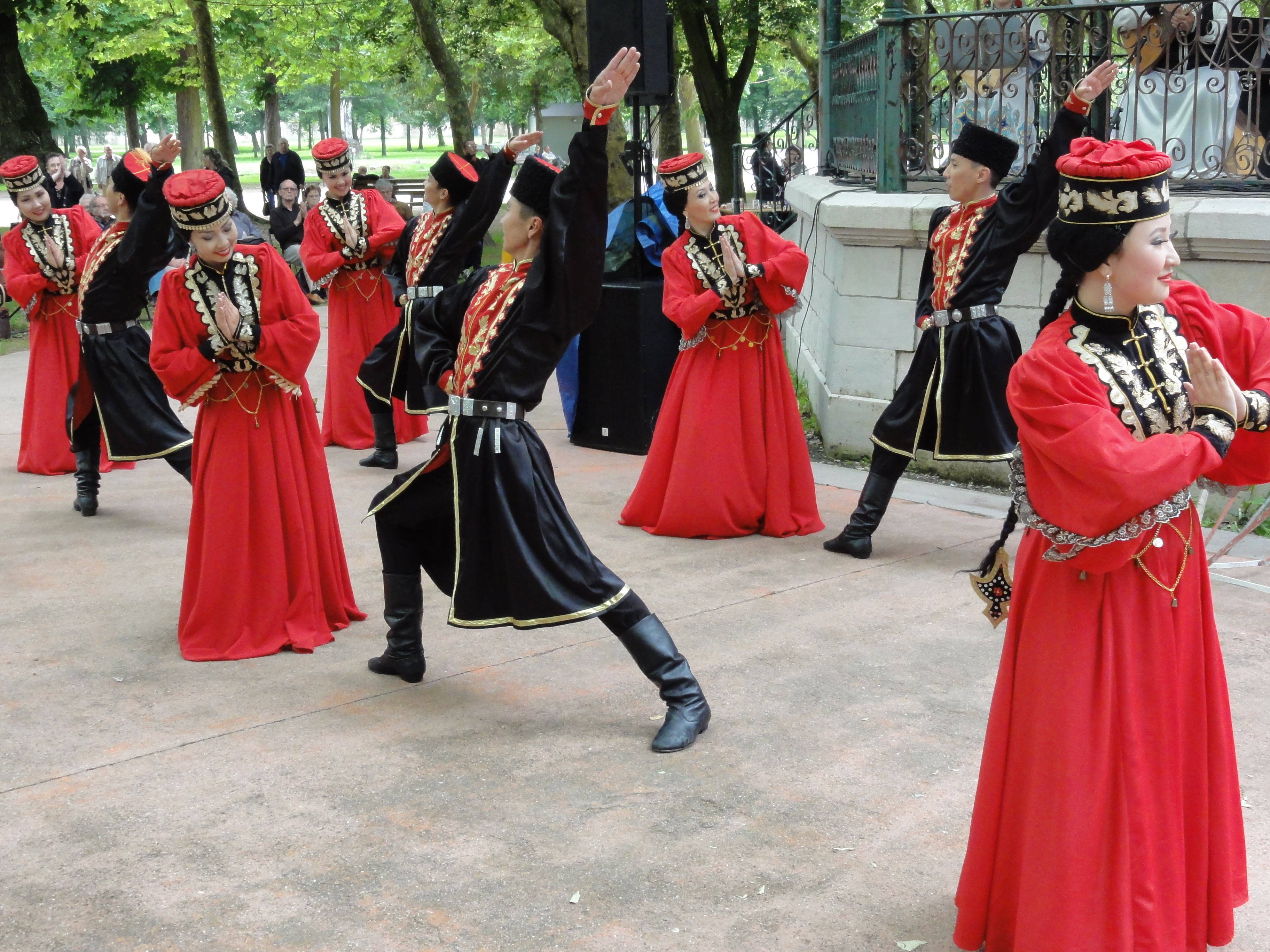 OIRATY, Ballet national de Kamoukie à Lunéville le 3 juillet 2016